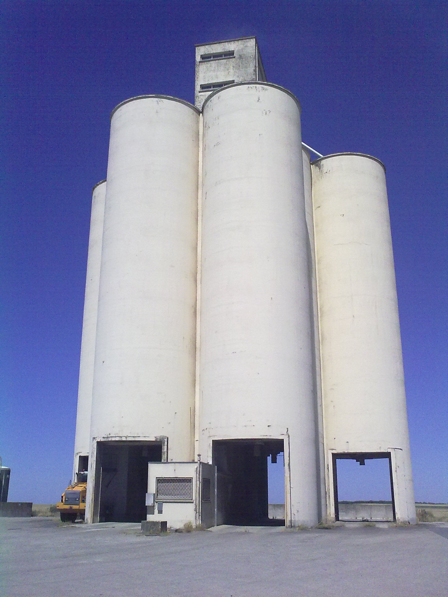 Silo agricole de Fresne